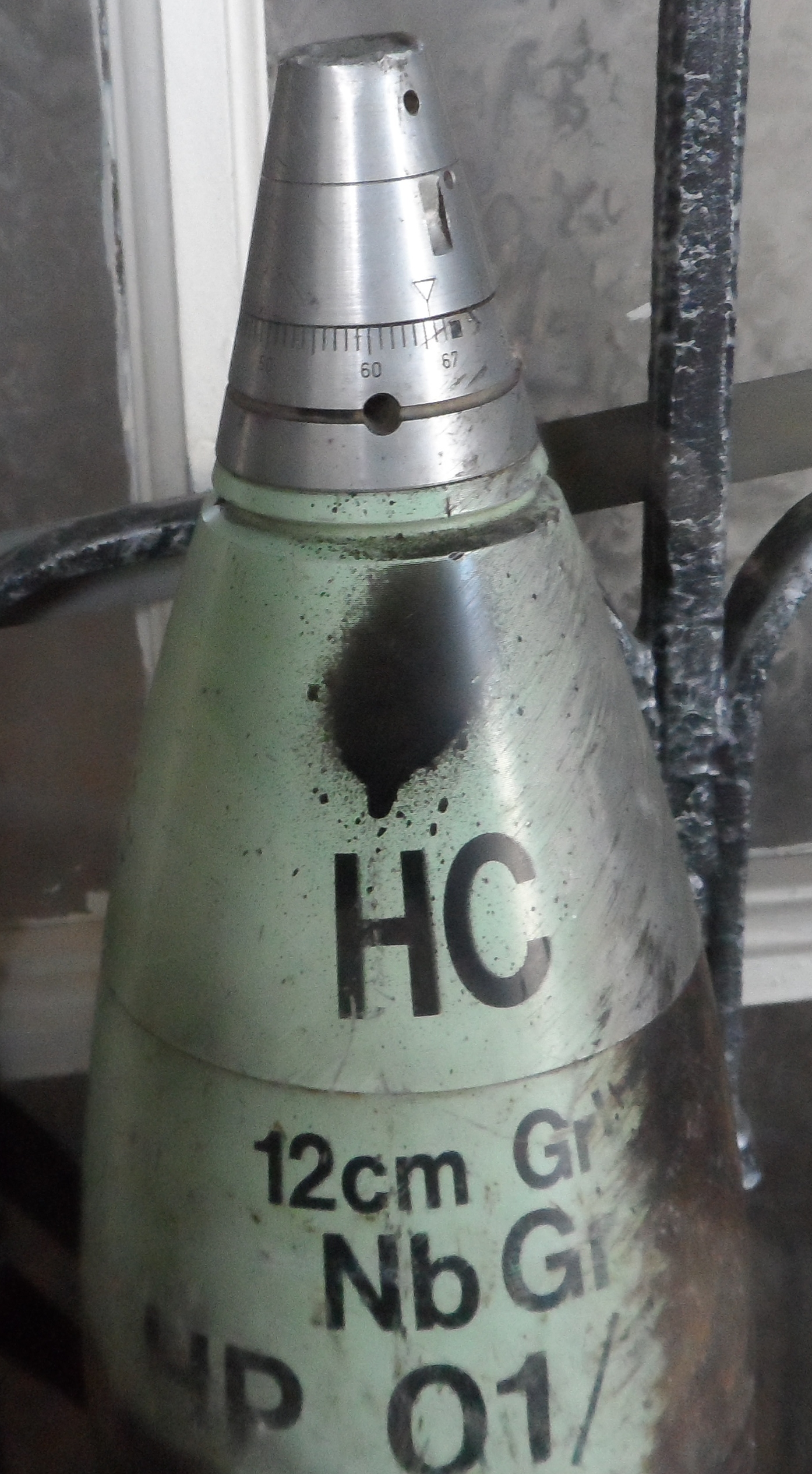 Zeitzünder (Kopfzünder) einer 120 mm Mörsergranate (HC-Nebel)